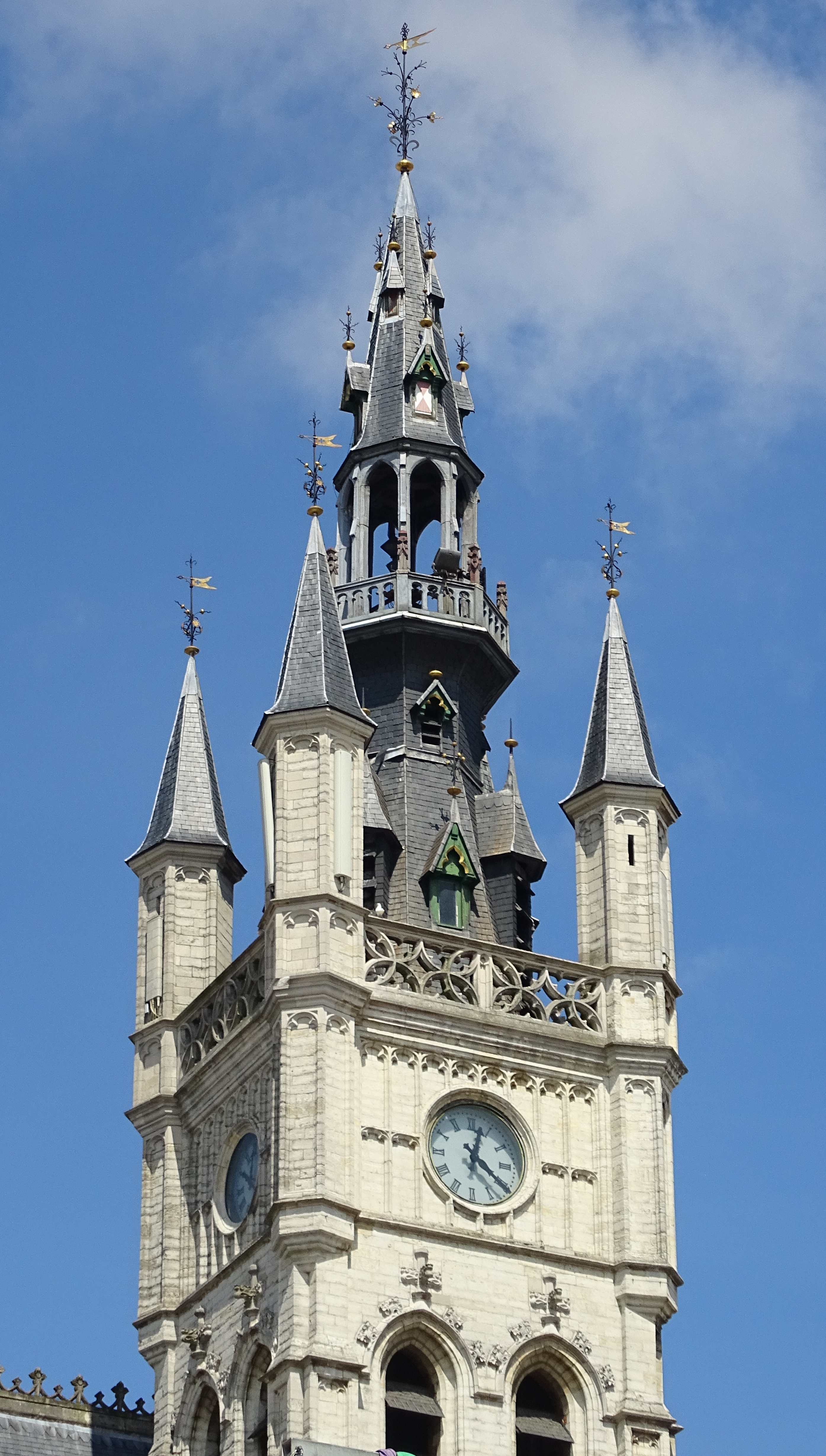 Reportage réalisé le samedi 9 juillet à l'occasion du départ et de l'arrivée du Grand Prix de la ville de Saint-Nicolas 2016 à Saint-Nicolas, Belgique.